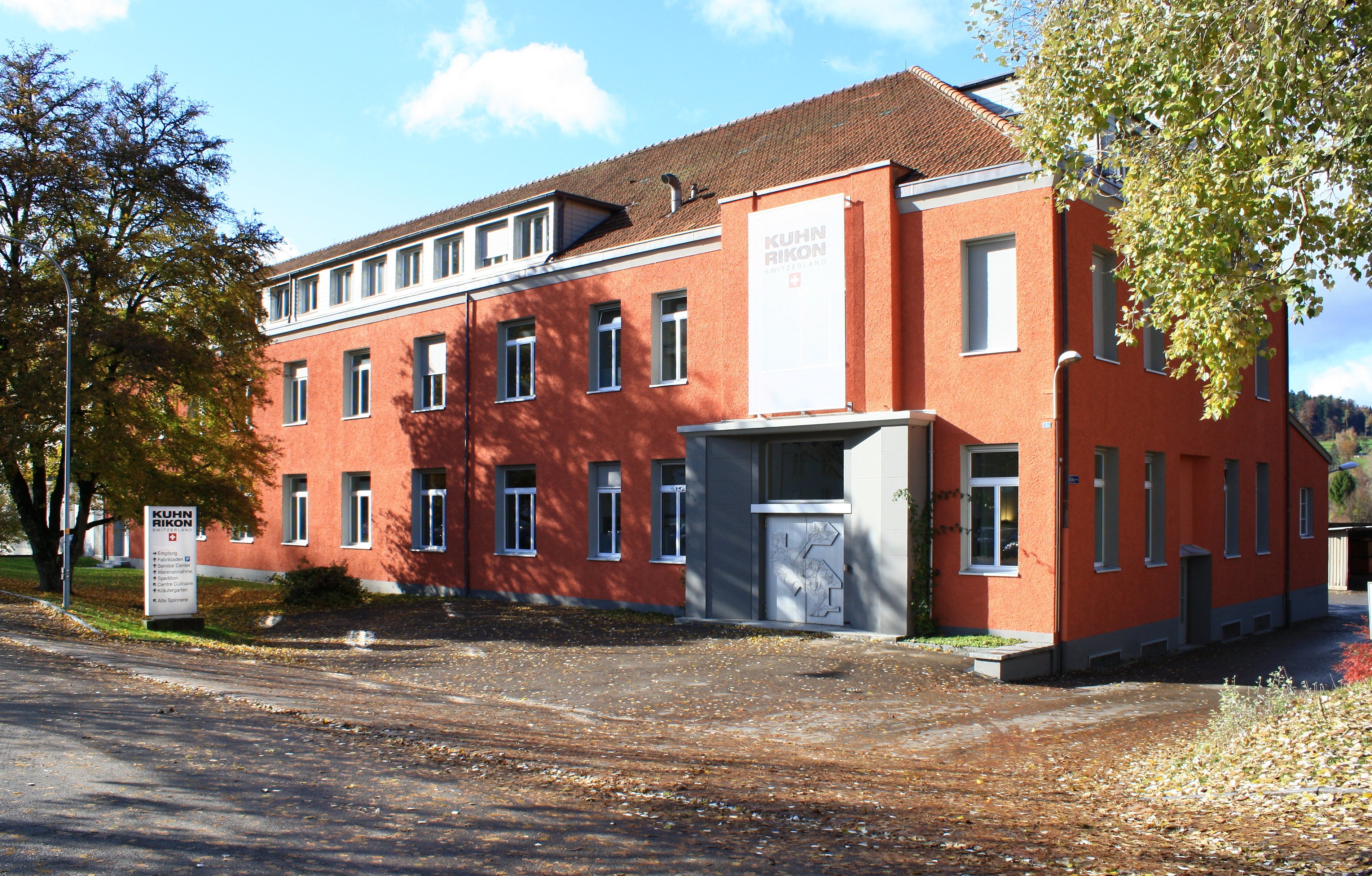 Kuhn Rikon building in Rikon in the Töss Valley (Tösstal) in Switzerland